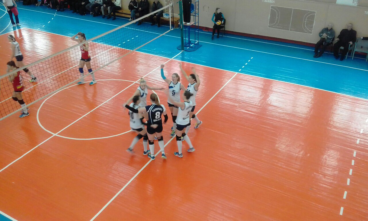 ВК "Педуніверситет-ШВСМ" (Чернігів) - клуб української волейбольної Суперліги